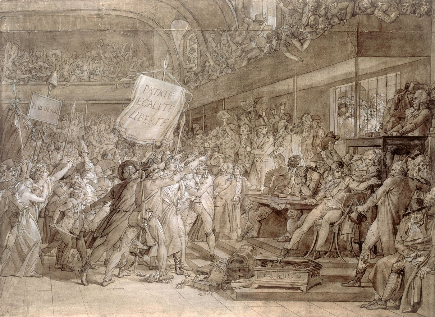 La journée du 10 août 1792 à l'Assemblée nationale (salle du Manège).